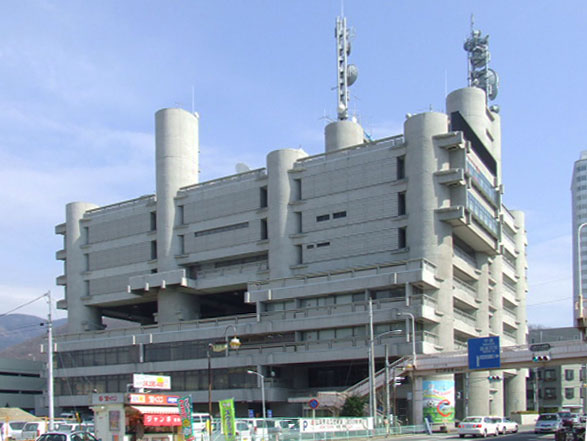 山梨文化会館 （山日YBSグループ本社）:山梨県甲府市にて撮影